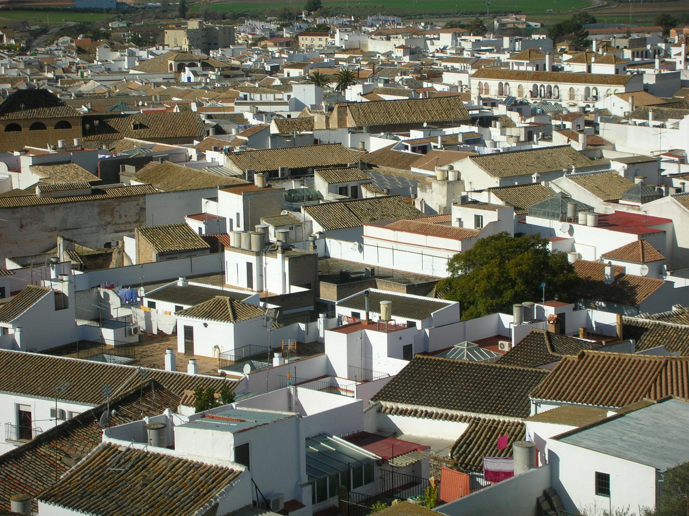 Vue sur les maisons blanches d'Osuna (Andalousie, Espagne).